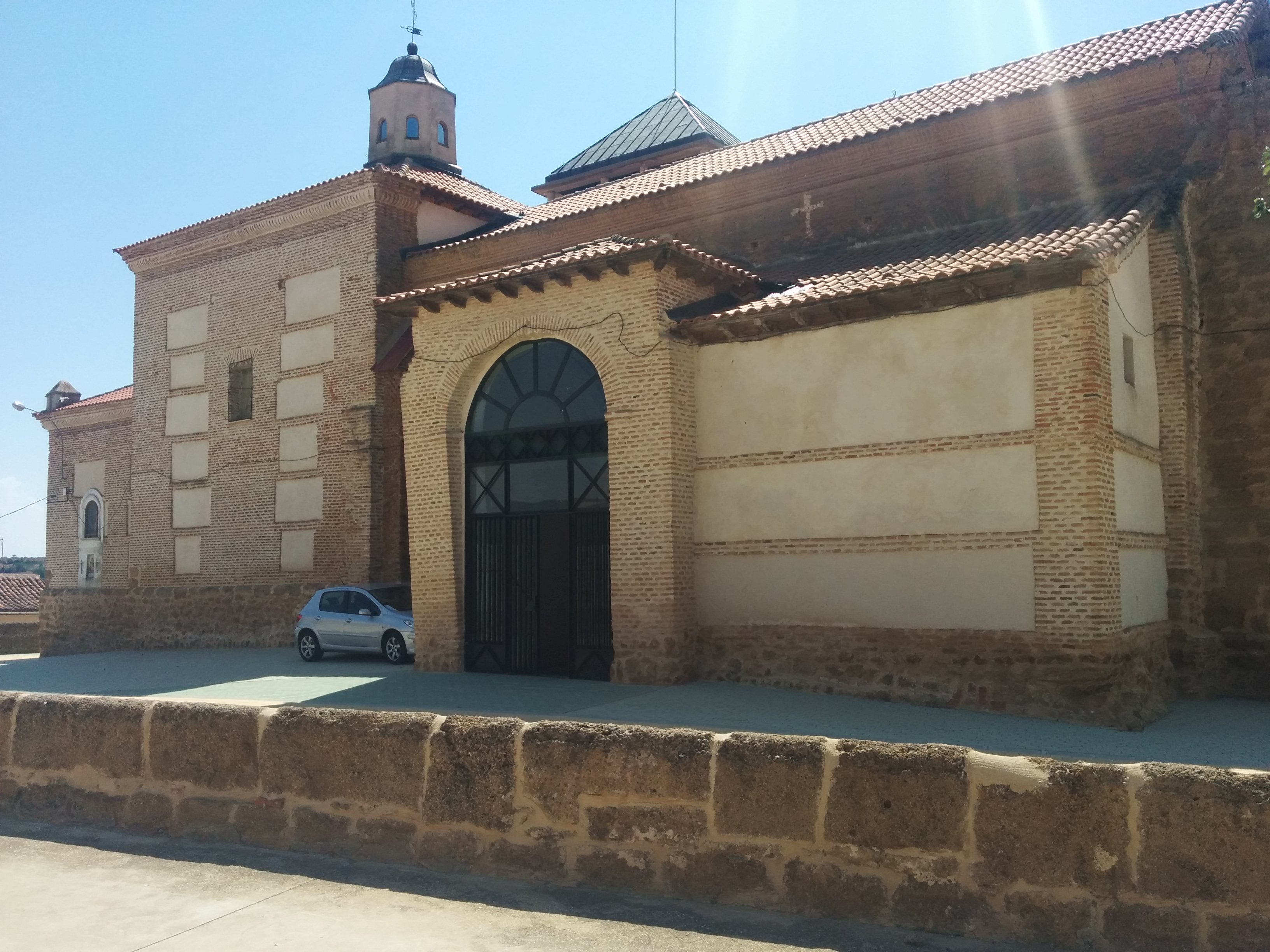 Lateral de la Parroquia de San Antón de Campazas